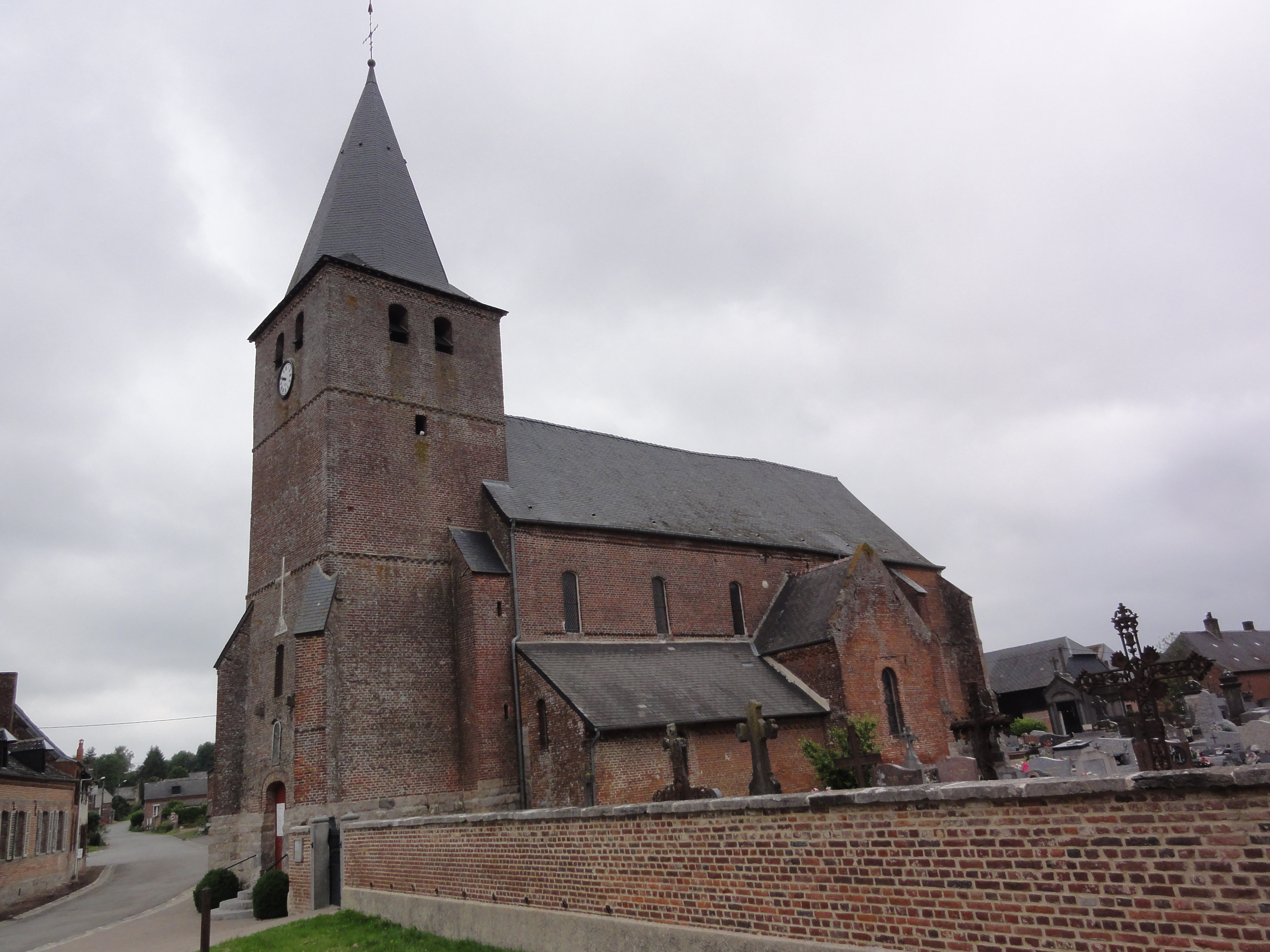 Sorbais (Aisne) église Saint-Martin